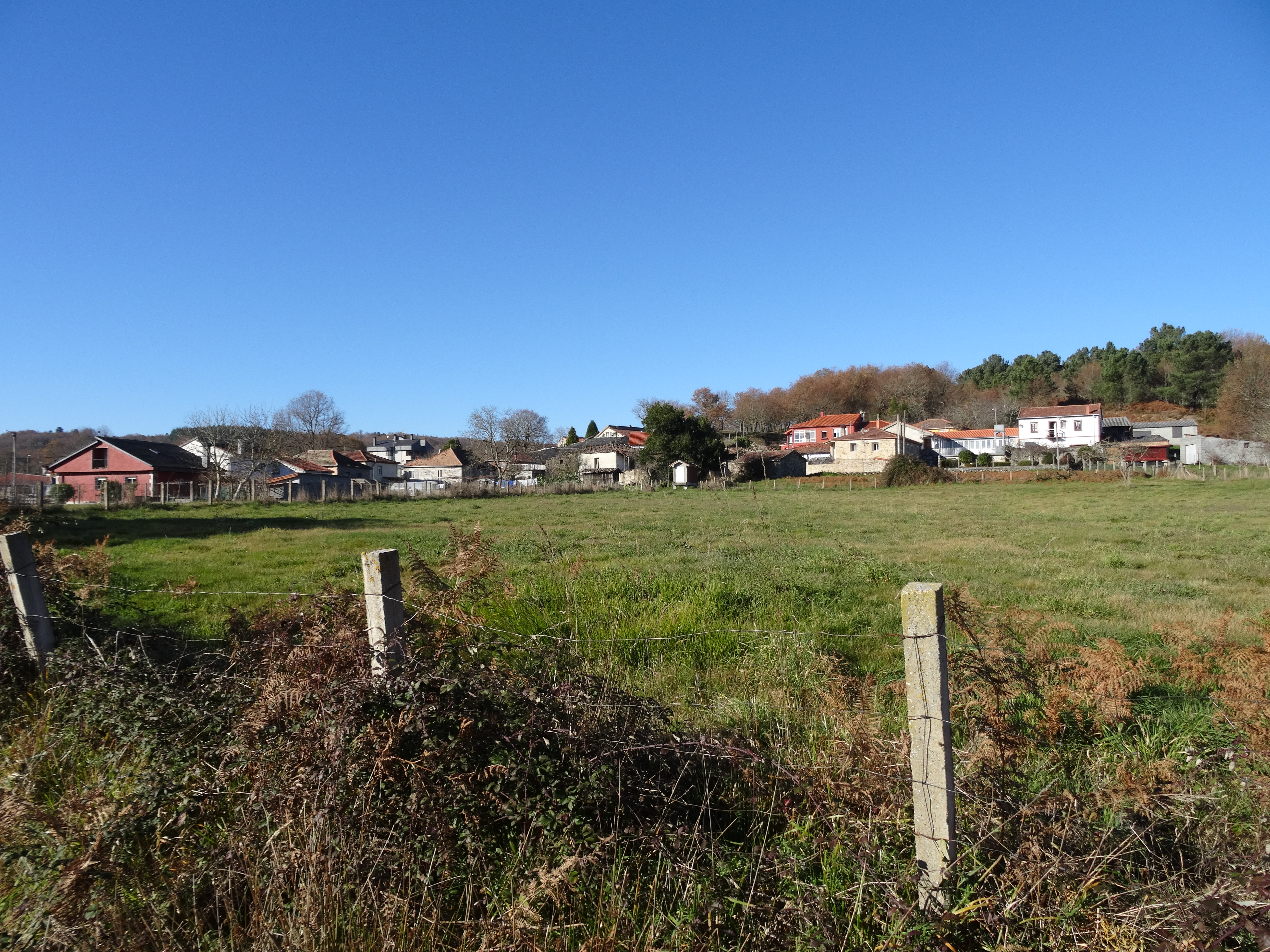 Ver título.